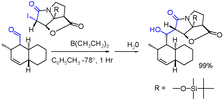 Reformatskii_Danishefsky_2006